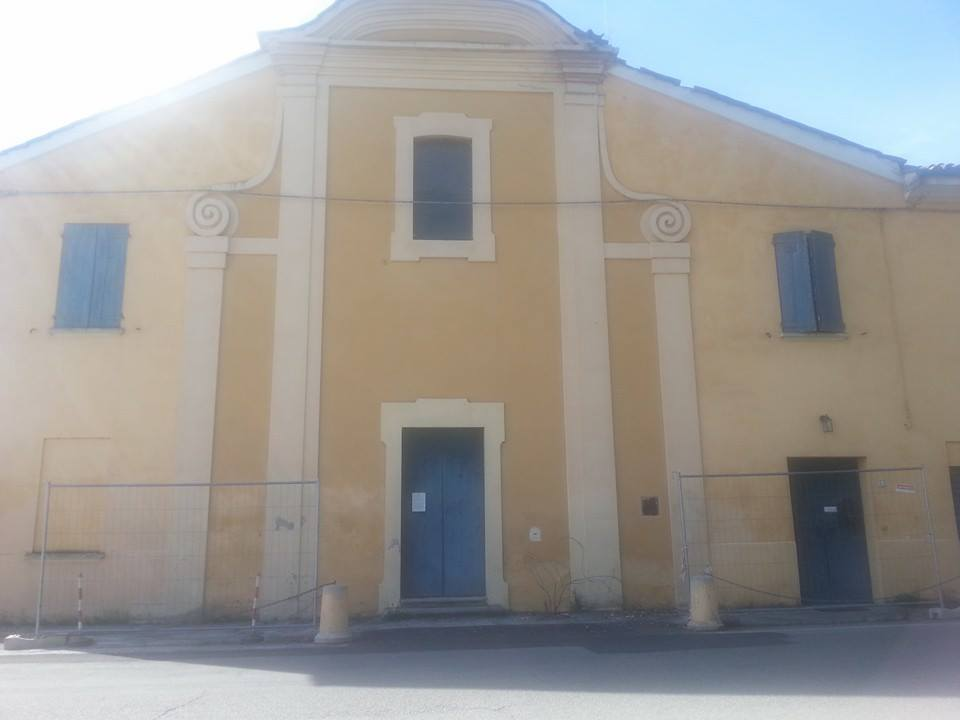 Oratorio di Santa Liberata (1572 Restaurato nel XVIII sec.)